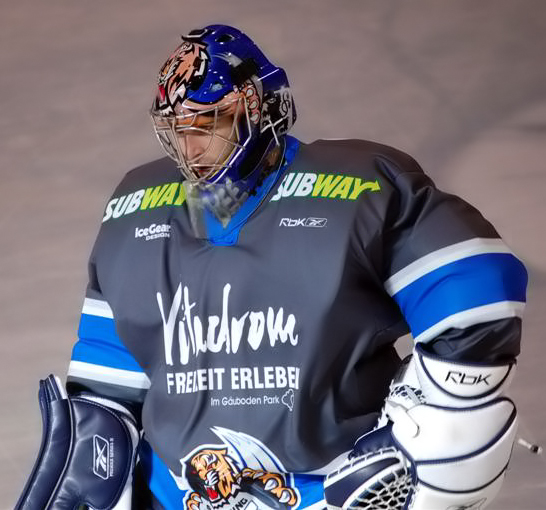 Markus Janka im Tor der Straubing Tigers